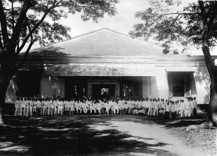 Foto. Groepsportret voor het gebouw van de Opleidingsschool voor Inlandse Ambtenaren te Makassar, Celebes.